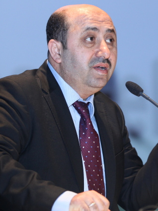 Ömer Döngeloğlu